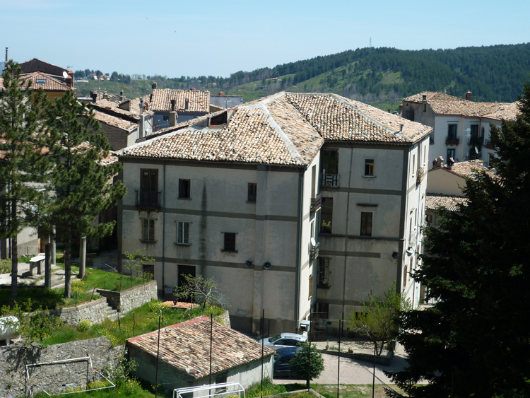 San Giovanni in Fiore - Palazzo Ernesto Banincasa